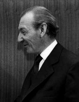 Title: Beglaubigungsschreiben DDR-Vertreter in UNO People in the image: Florin, Peter: Stellvertretender Außenminister, UNO-Botschafter, Staatsratsmitglied, DDR * Waldheim, Kurt Dr.: Generalsekretär der UNO, Bundespräsident, Österreich (GND 118771000) Factual corrections and alternative descriptions are encouraged separately from the original description. Additionally errors can be reported at this page to inform the Bundesarchiv. Original historic description: ADN-ZB Spremberg 21.9.73-New York: Ständiger UNO-Vertreter der DDR überreichte Beglaubigungsschreiben Der von der Regierung der DDR ernannte Ständige Vertreter der Deutschen Demokratischen Republik bei den Vereinten Nationen, Peter Florin, Stellvertreter des Ministers für Auswärtige Angelegenheiten und Außerordentlicher und Bevollmächtigter Botschafter (links), überreichte am 20.9.73 in New York UNO-Generalsekretär Dr. Kurt Waldheim sein Beglaubigungsschreiben.